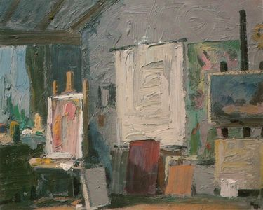 Atelier des Künstlerstitle QS:P1476,de:"Atelier des Künstlers" label QS:Lde,"Atelier des Künstlers"